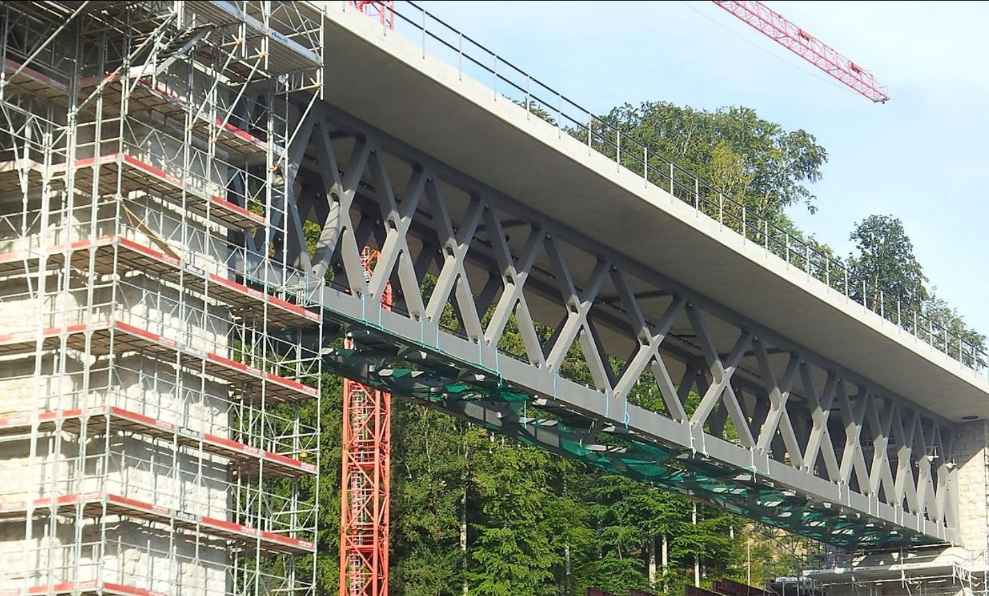 Fachwerkbrücke im Saane-Viadukt bei Gümmenen, verbreitert, Bogenbrücke noch in Arbeit